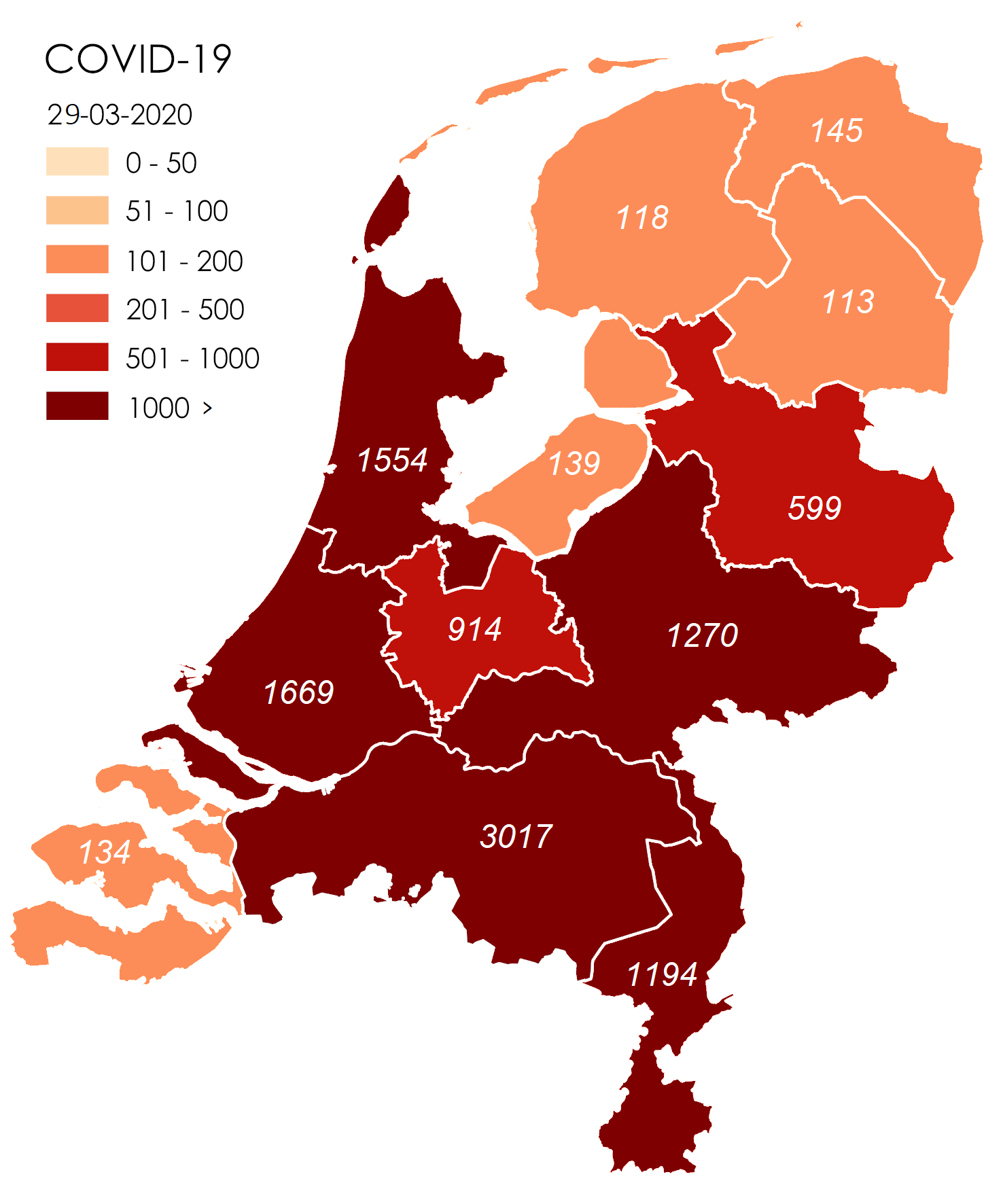 Cijfers via pagina 10.